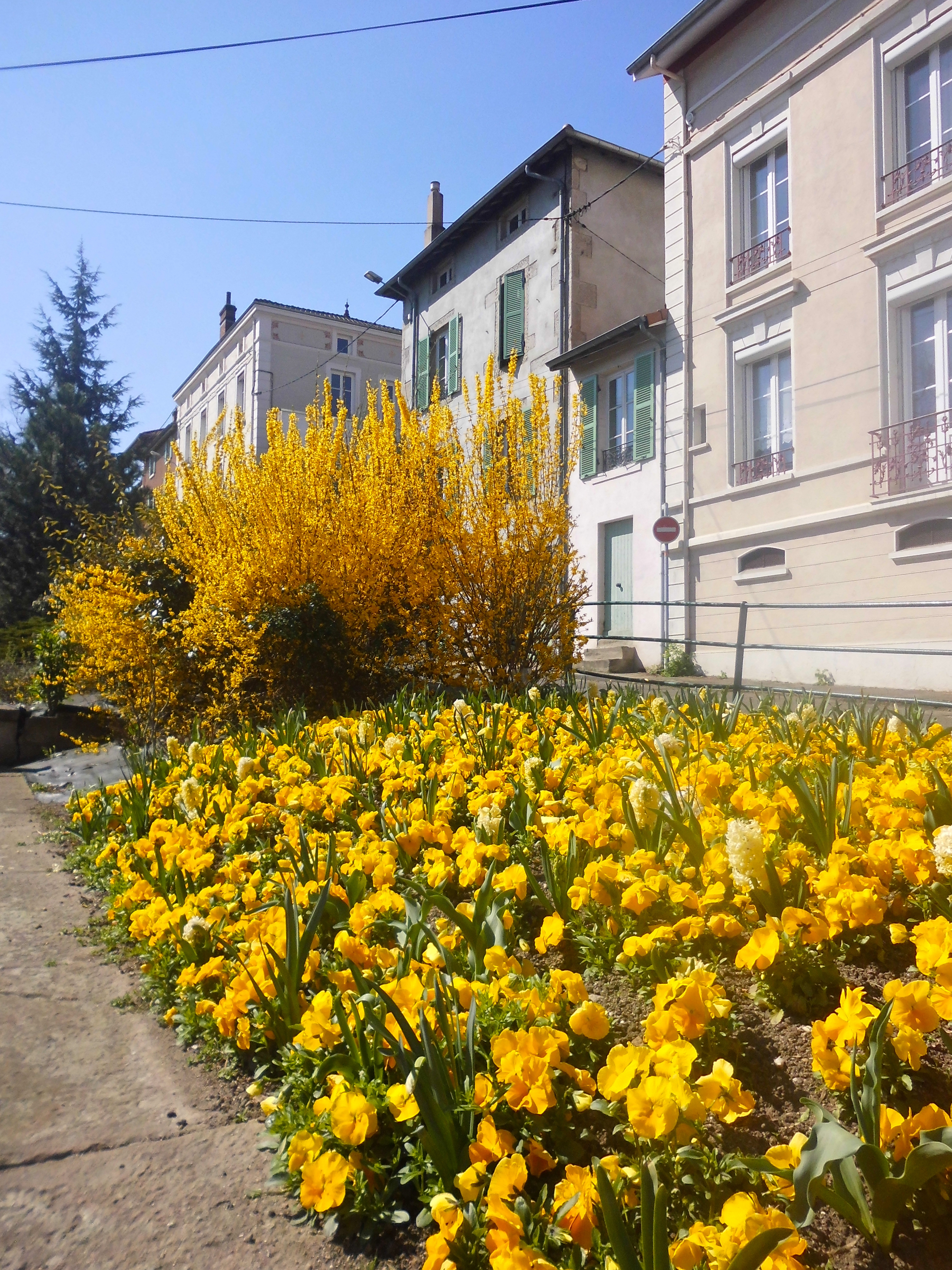 Saint-Chamond (Loire), entre la gare et la rue du Pont-Fournas, 7 avril 2015.